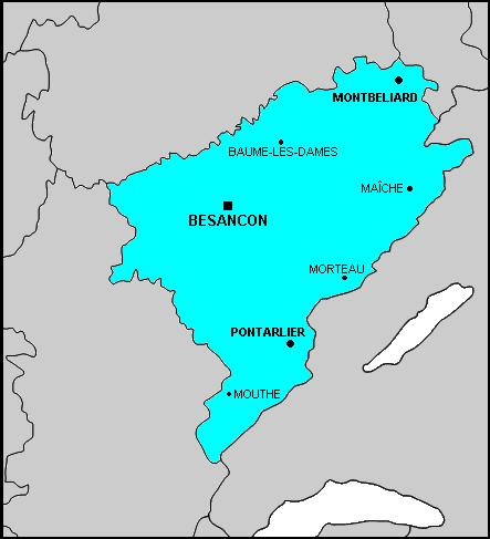 doubs